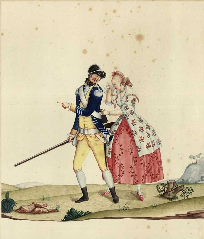 Soldado do regimento de infantaria de Moura (c. 1767) despedindo-se de moça que chora.